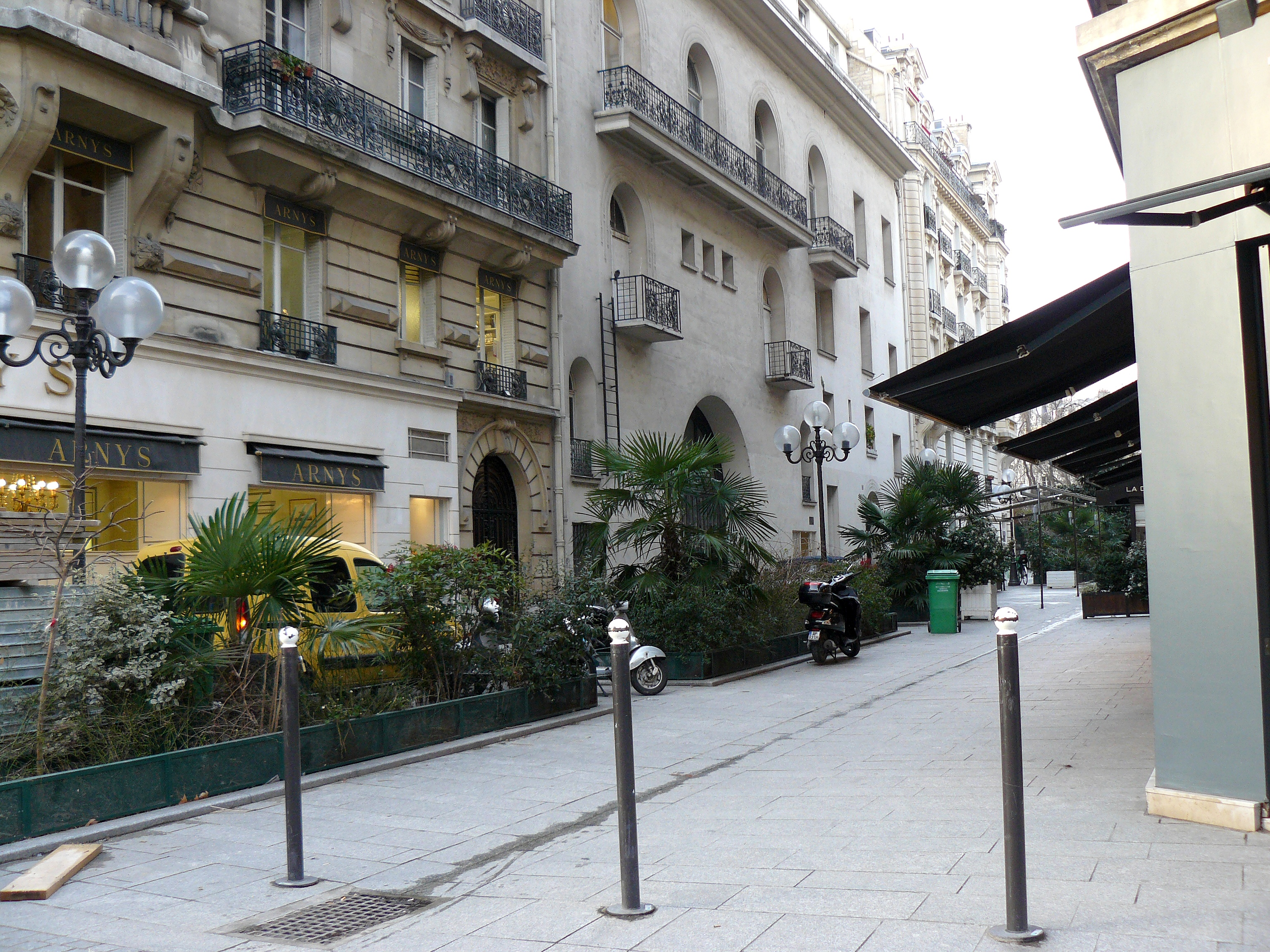 Rue Récamier, dans le 7e arrondissement de Paris. Rue piétonne en impasse, à gauche, l'ancien Théâtre Récamier fermé en 1976.